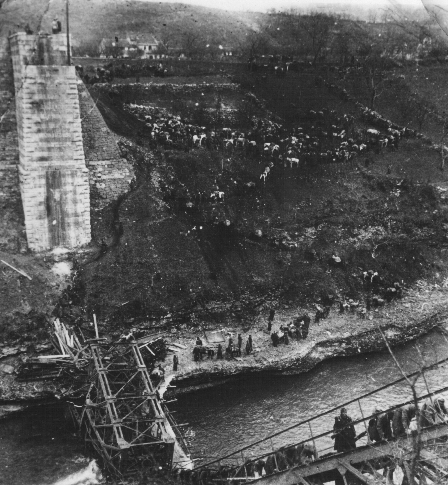 Srpskohrvatski / српскохрватски: Borci 9. dalmatinske divizije prenose ranjenike preko Neretve, marta 1943. godine.